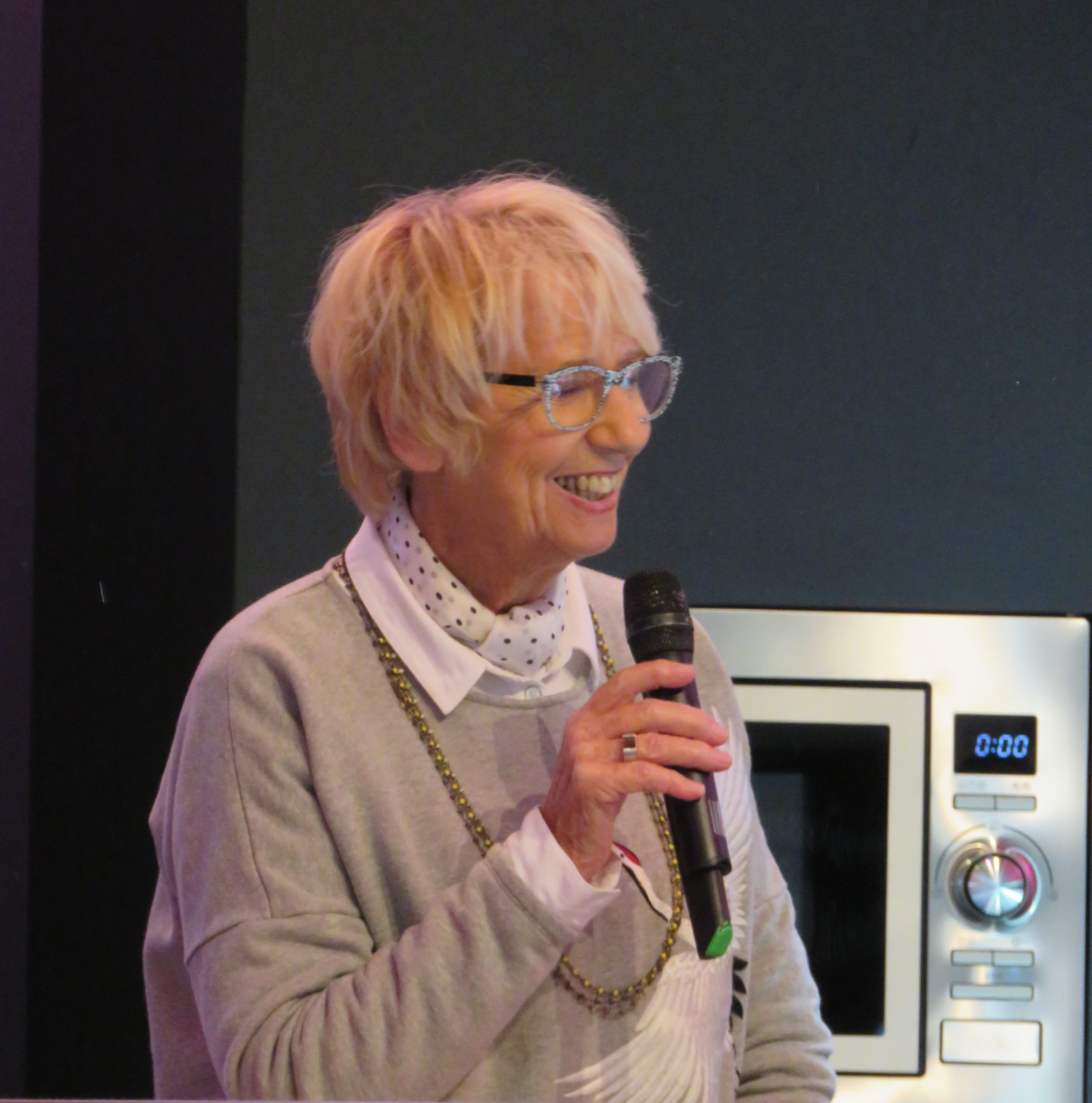 Mercotte présentant des démonstrations de cuisine au Salon du Chocolat 2017 - Parc des Expositions - Porte de Versailles.